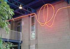 Innenraum des WWG/SK